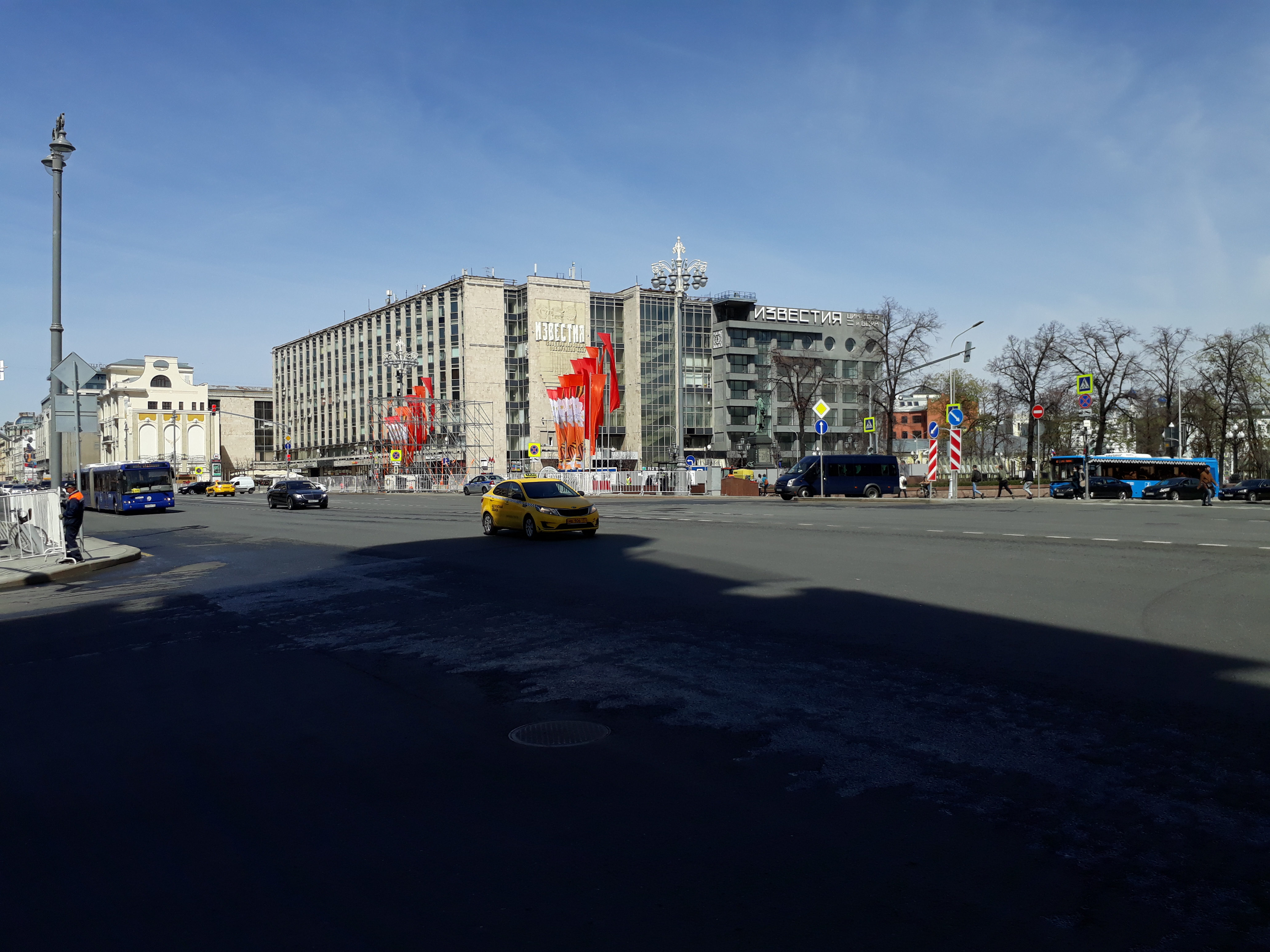 Вид на здание бывшей редакции газеты "Известия". Пушкинская площадь, Москва. 5 мая 2017г.